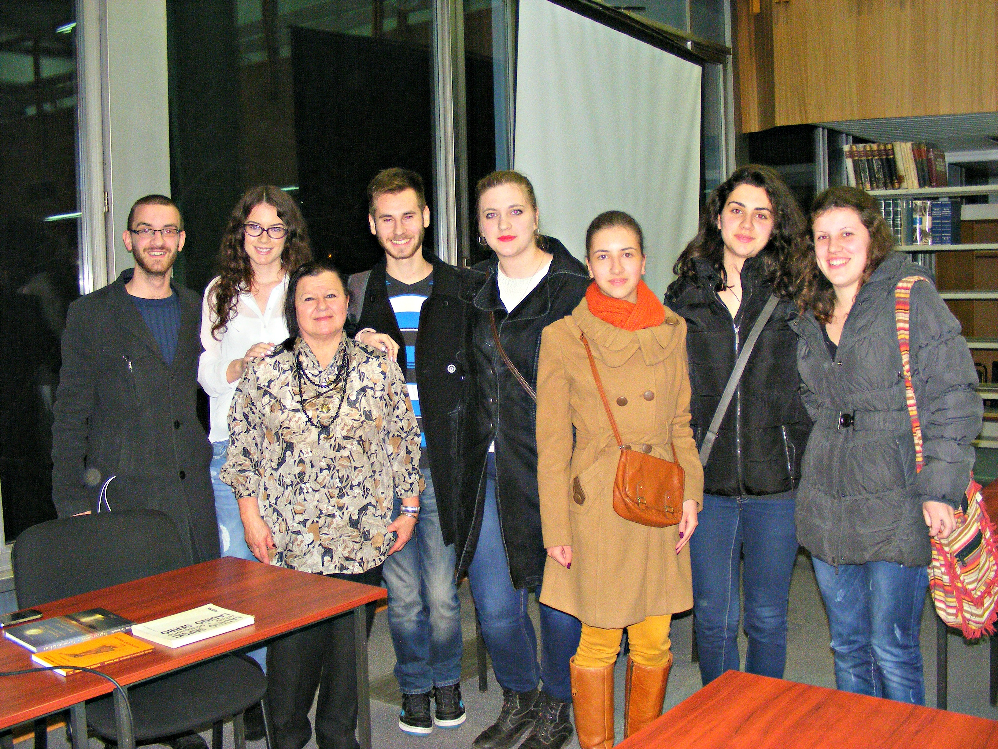 Српски (ћирилица): Дрита Тутуновић са студентима шпанског језика на Филолошком факултету Универзитета у Београду